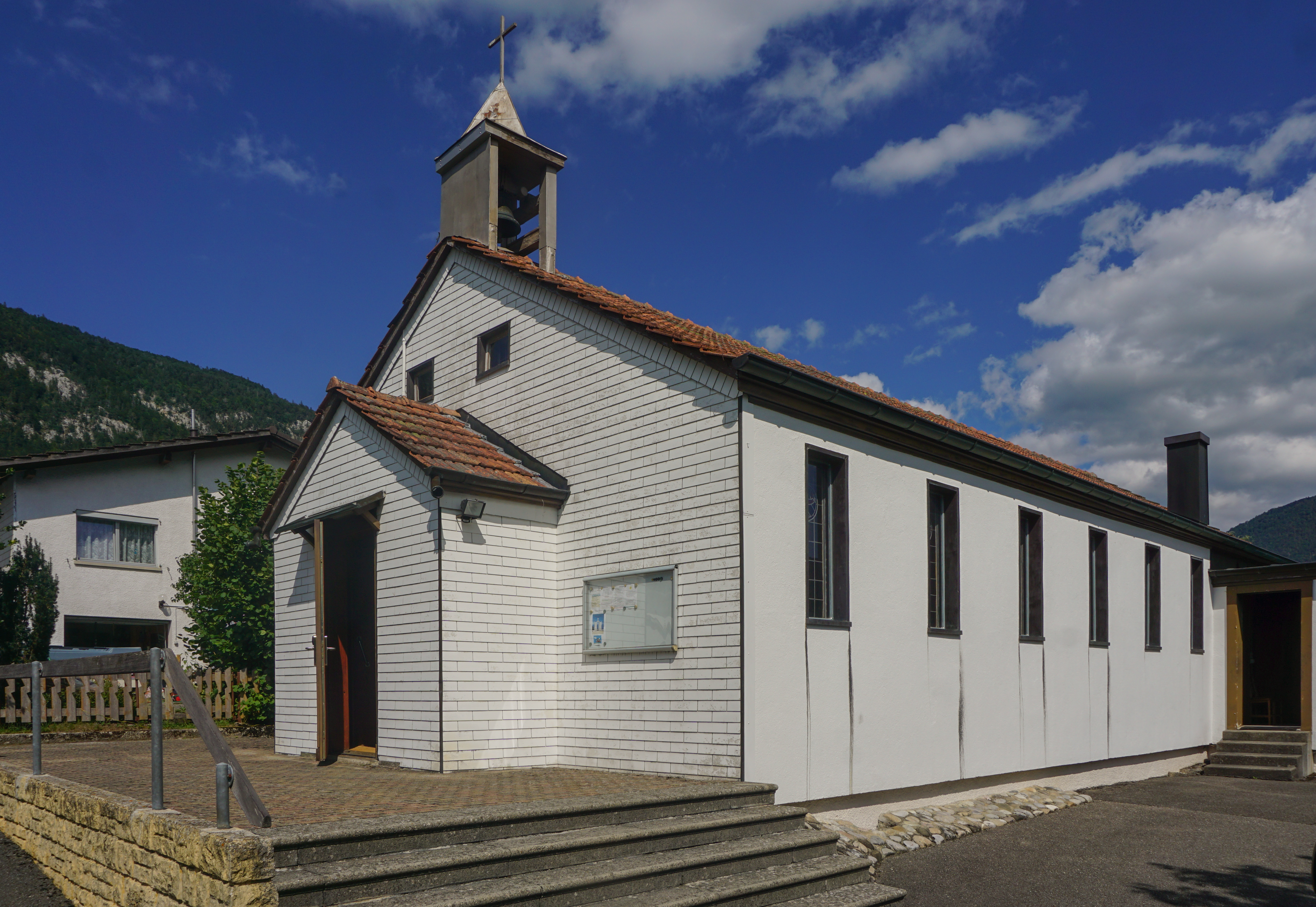 Kapelle Notre-Dame de Raimeux, Eingang